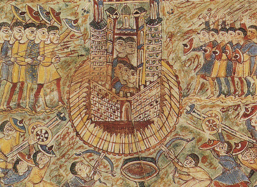 Siège d'une cité carolingienne